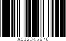 An code32 Italian Farmacode representing 01234567. Created using Barcode Writer in Pure PostScript.